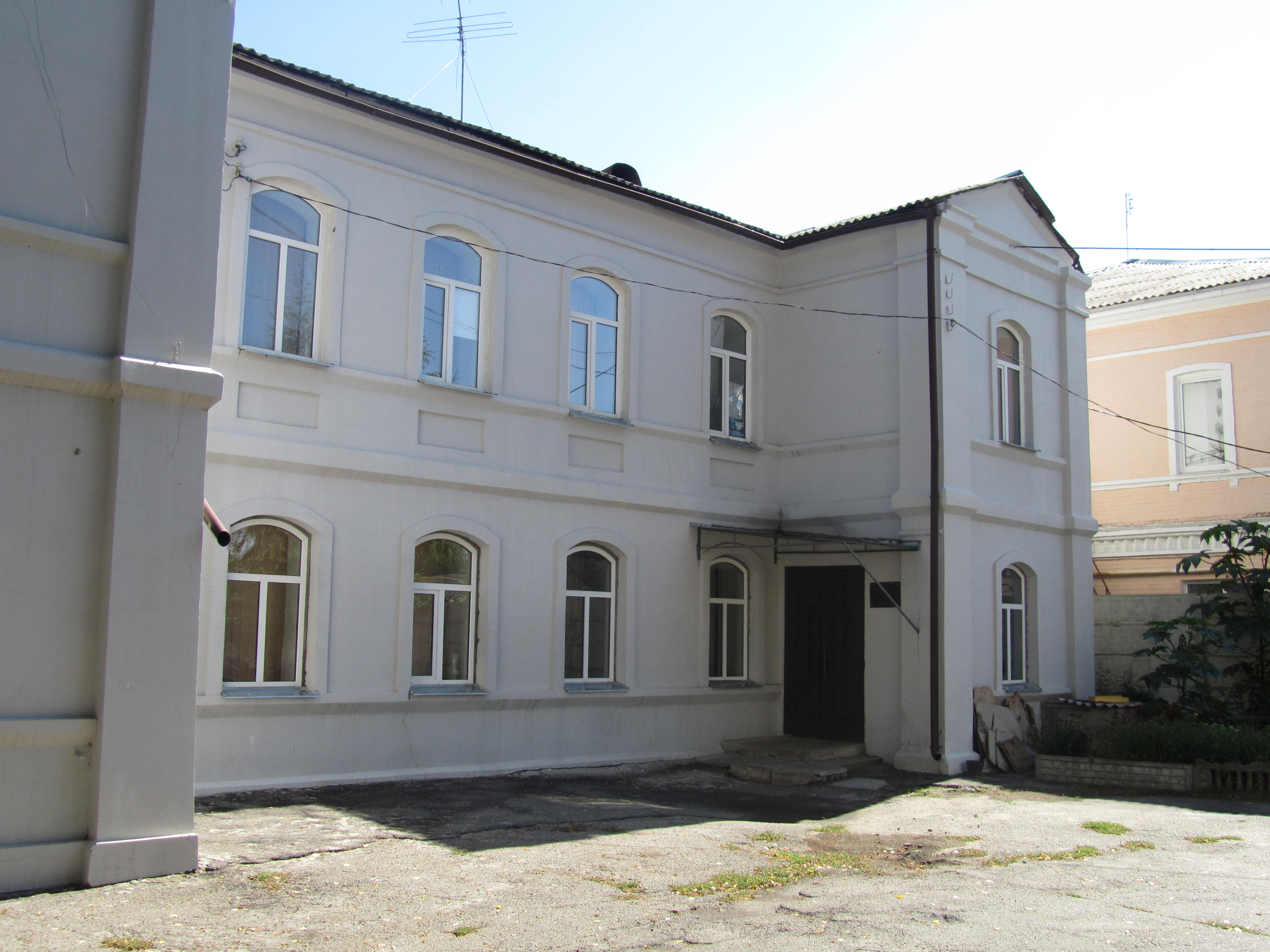 Зміїівська дитяча музична школа